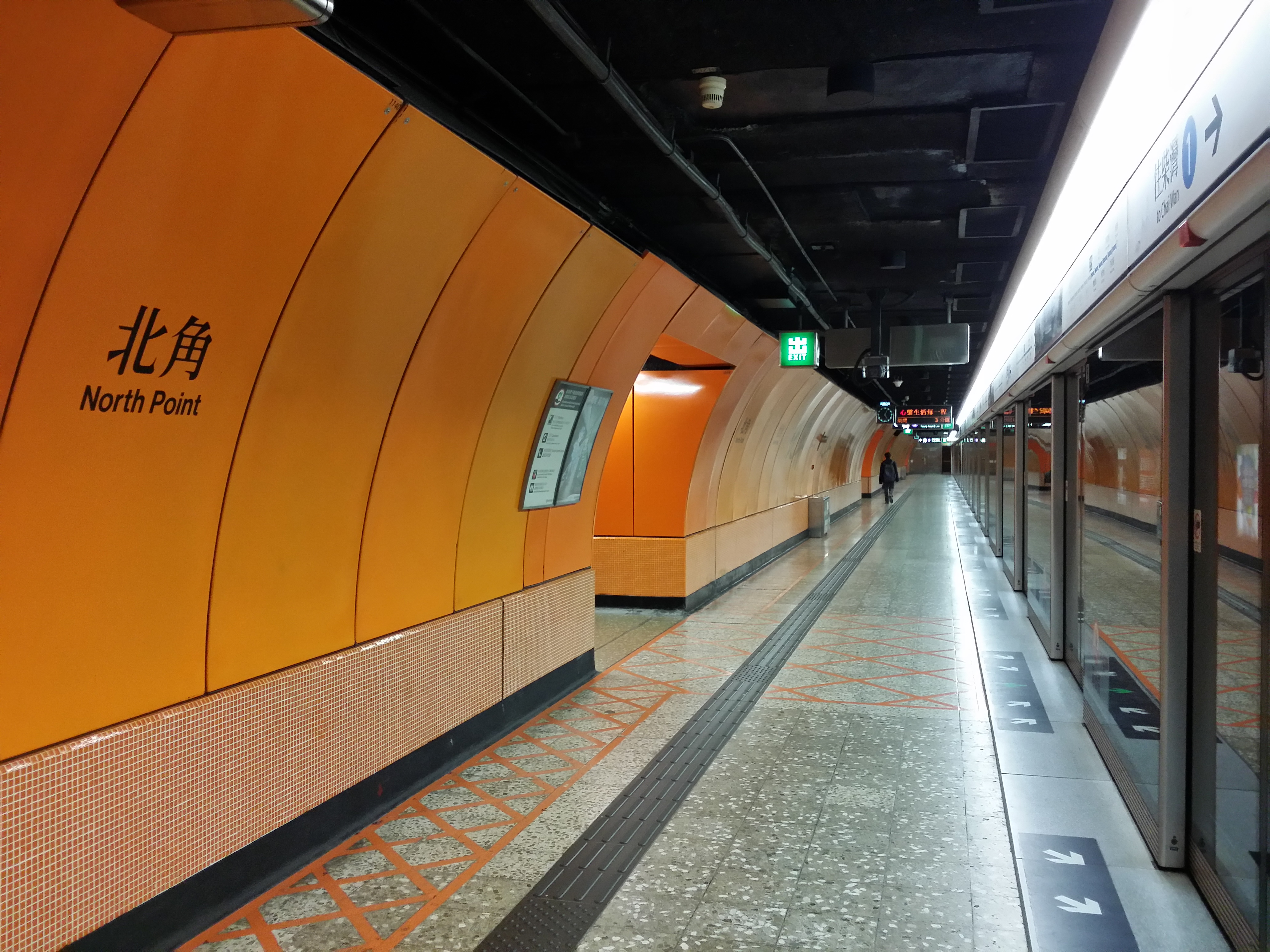 港鐵北角站月台